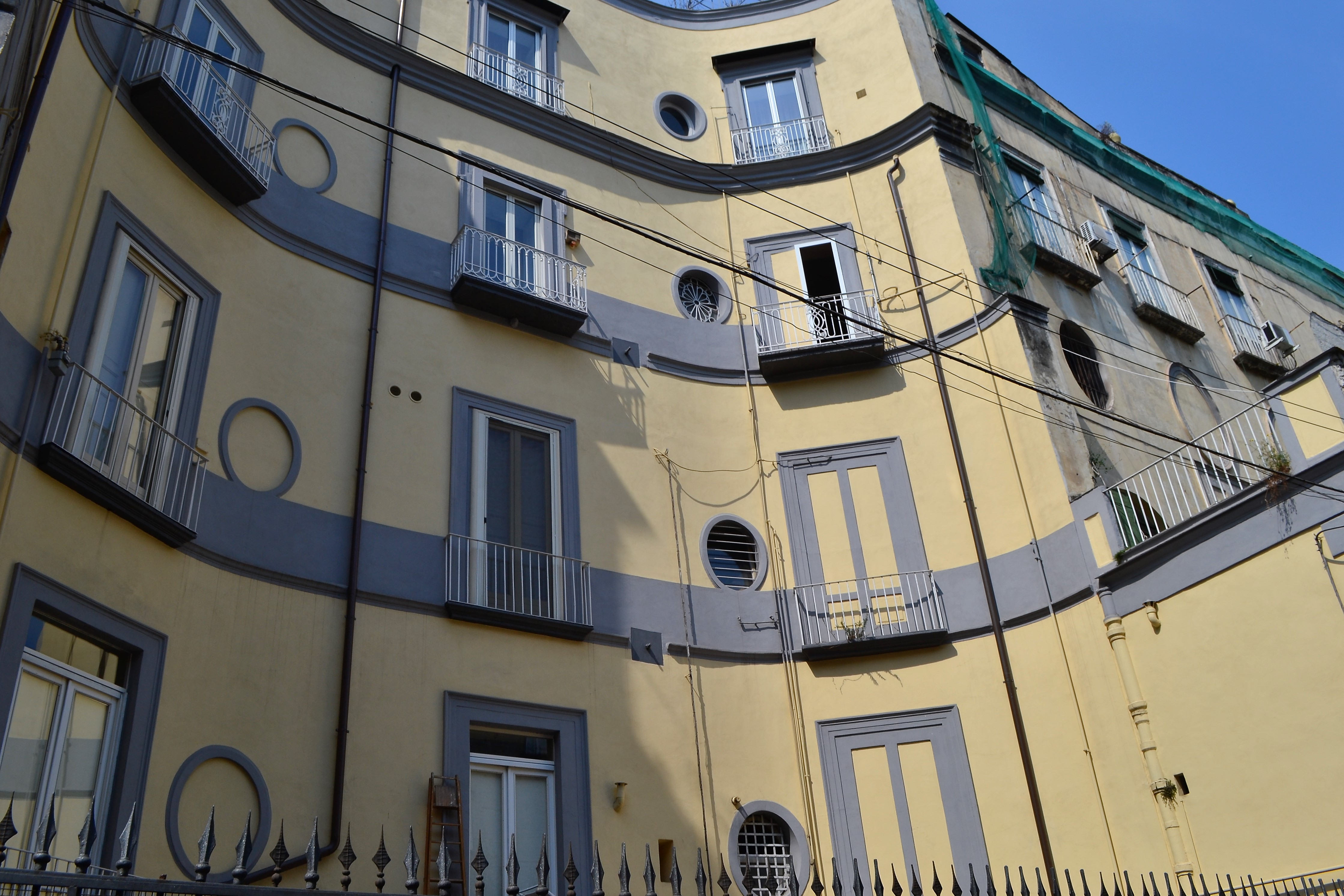 Palazzo di Majo è un palazzo di Napoli situato all'inizio del rione Sanità nel quartiere Stella; l'ingresso è ubicato in discesa Sanità 68, mentre da via Santa Teresa degli Scalzi è visibile il cortile.